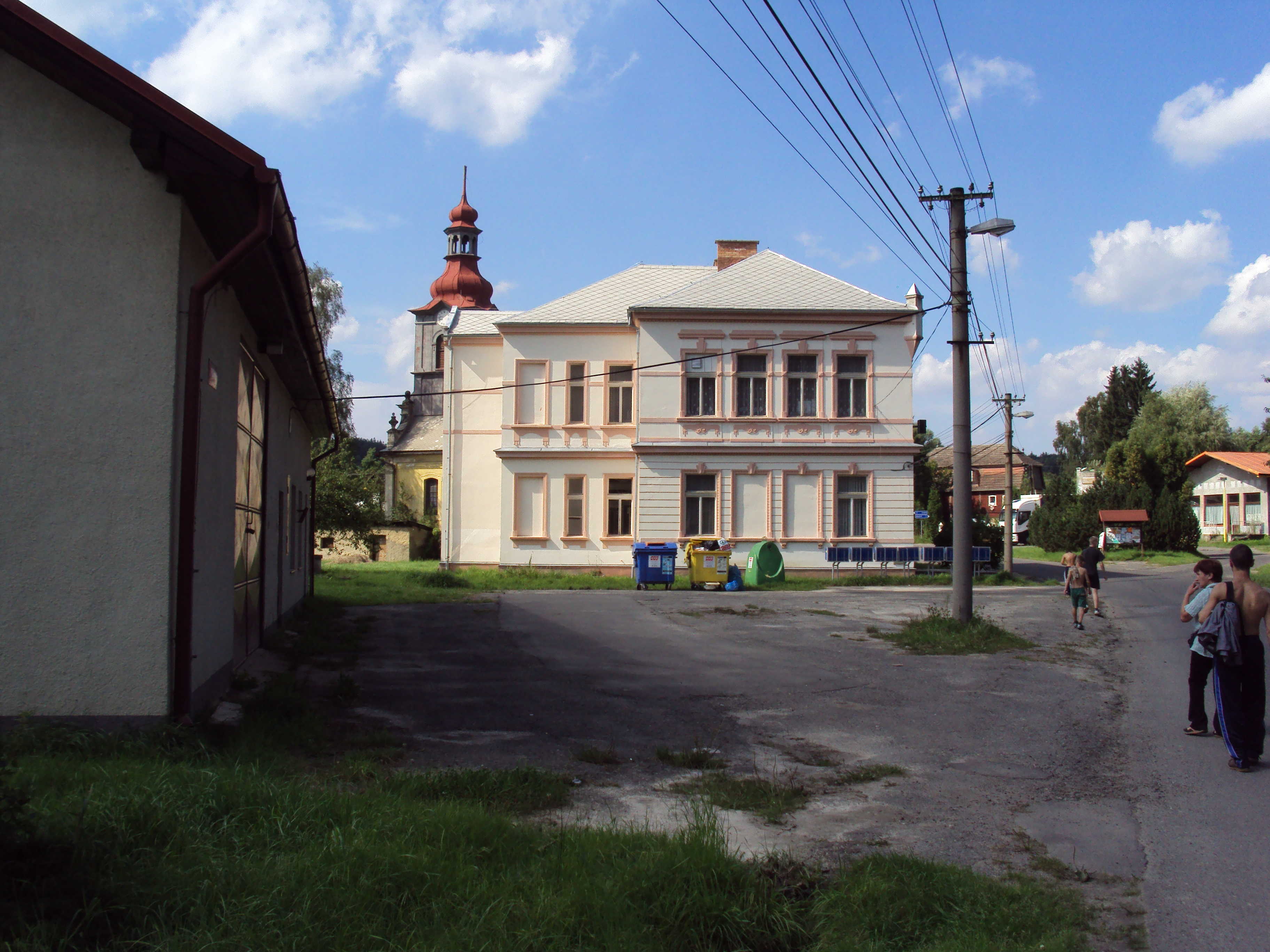 Obecní úřad je na návsi vedle kostela, fotka z boku kvůli světlu